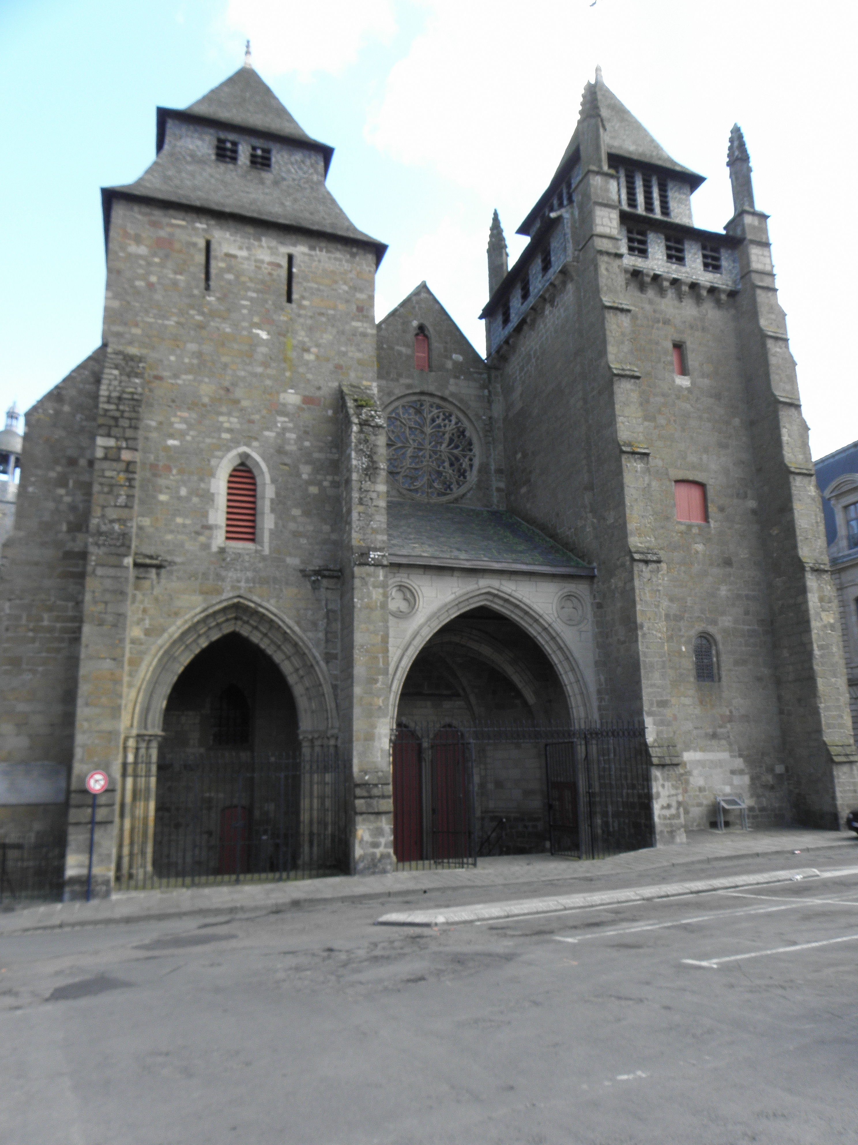 Façade occidentale de la cathédrale Saint-Étienne de Saint-Brieuc (22).